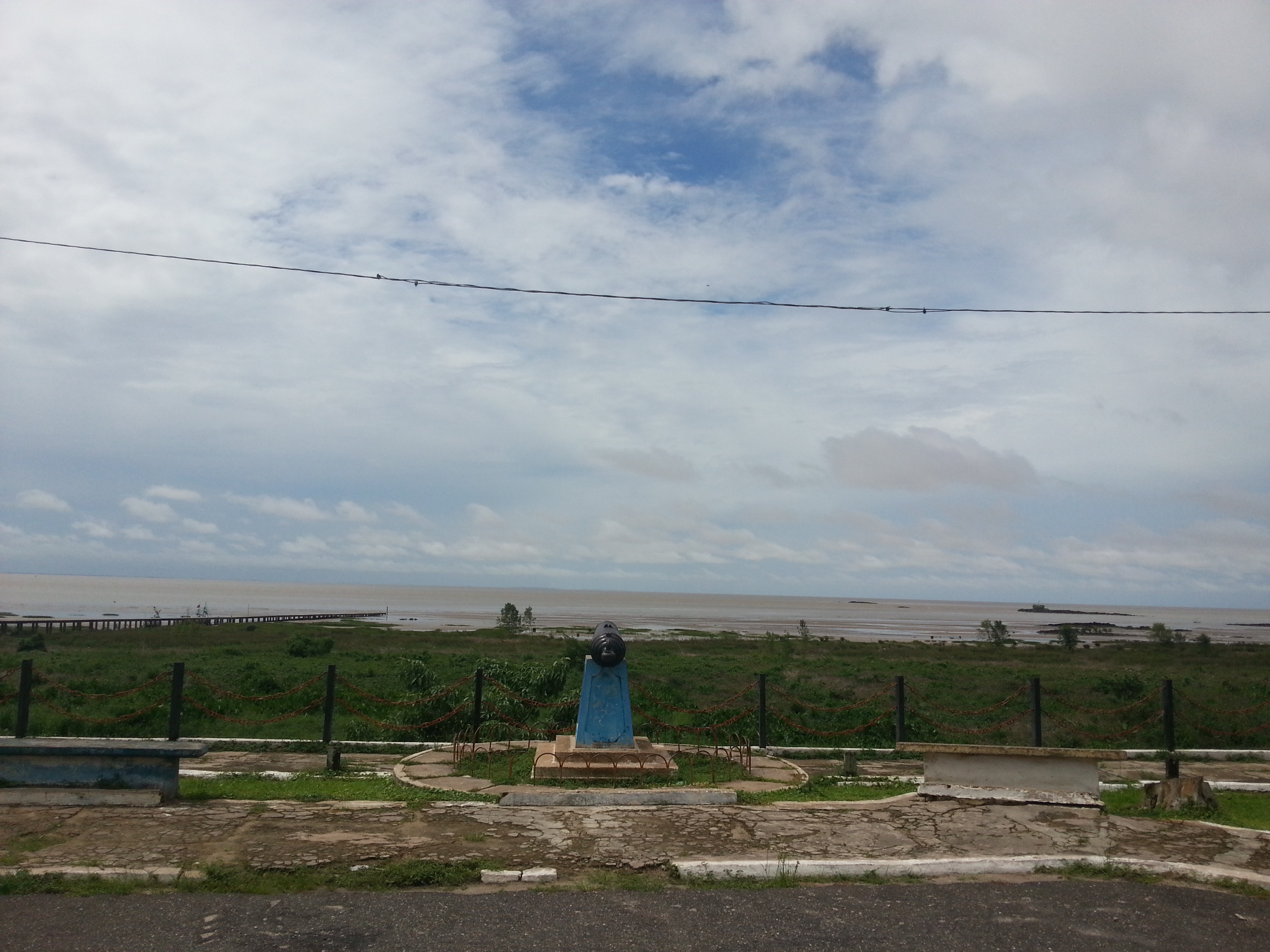 Colares, em frente a Igreja - Baia do Marajó - Local de observação do registro 4 relatado pelo Padre Alfredo de La Ó - Registros de Observações de OVNI - I COMAR